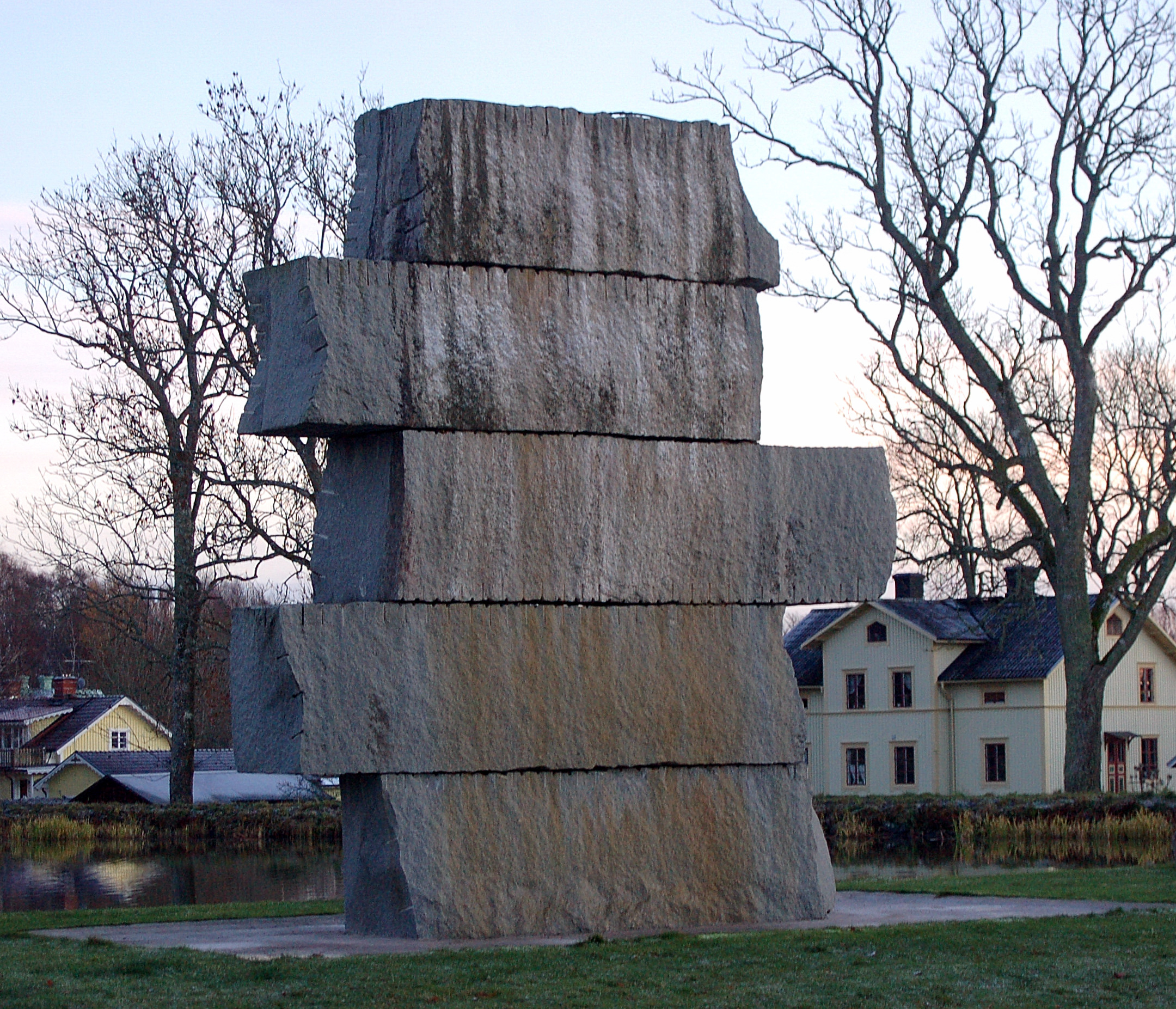 Vattentrappa utförd av Bengt Olson 2007 i granit från Tossene i Bohuslän. Skulpturen uppfördes till Göta kanals 175-årsjubileum vid Göta kanal i Sjötorp.